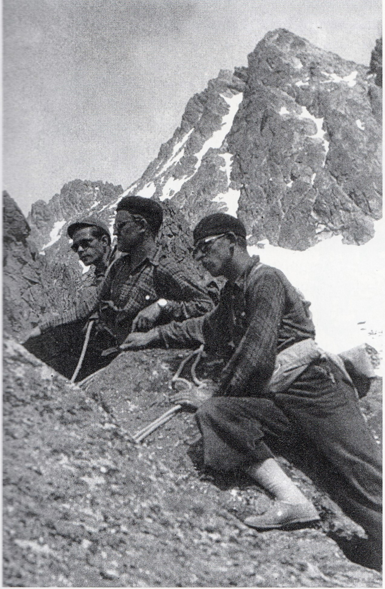 Horolezci horolezeckého spolku JAMES na Dračom hrebeni vo Vysokých Tatrách v roku 1939- Slovakia